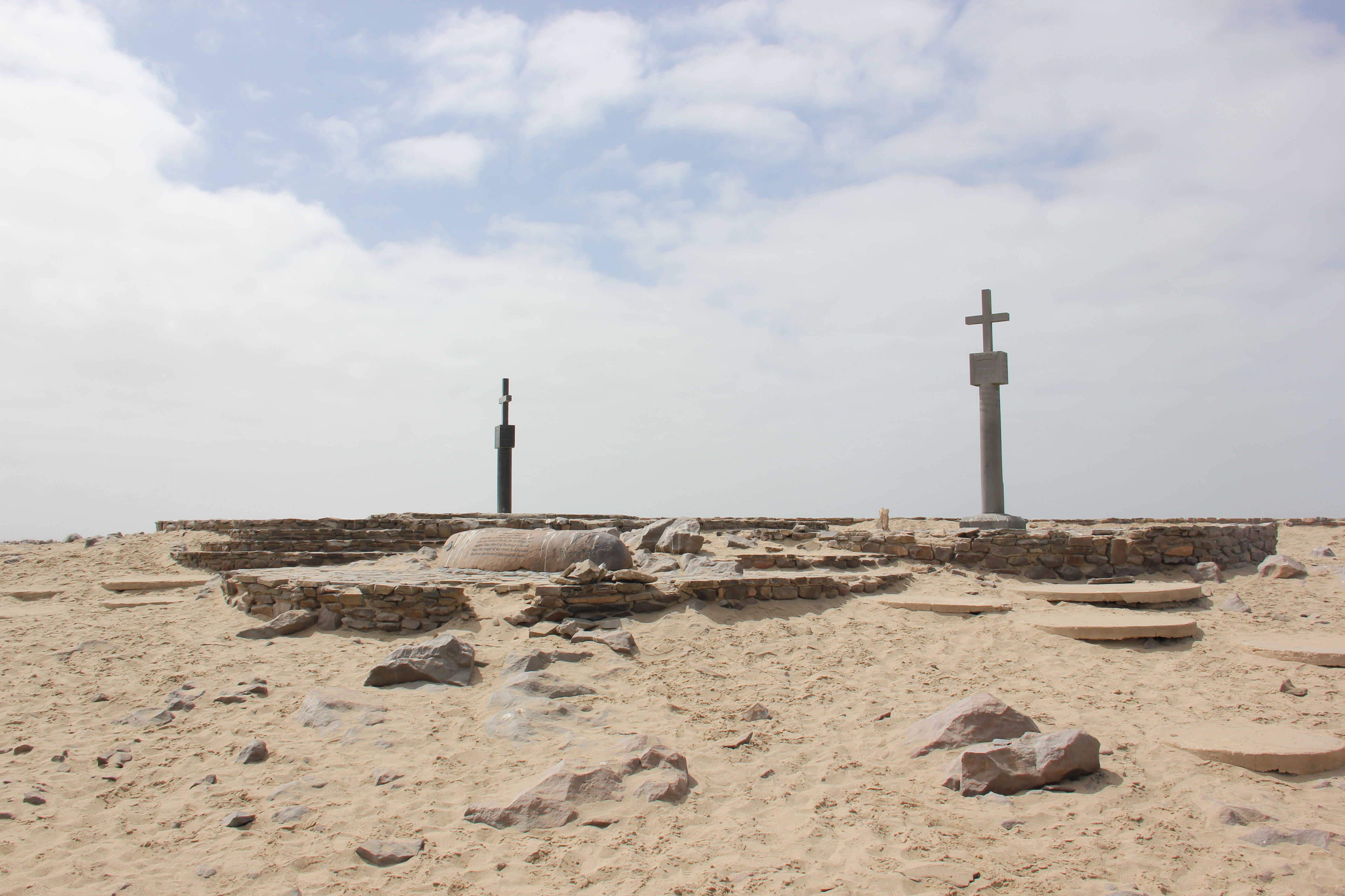 Cape Cross